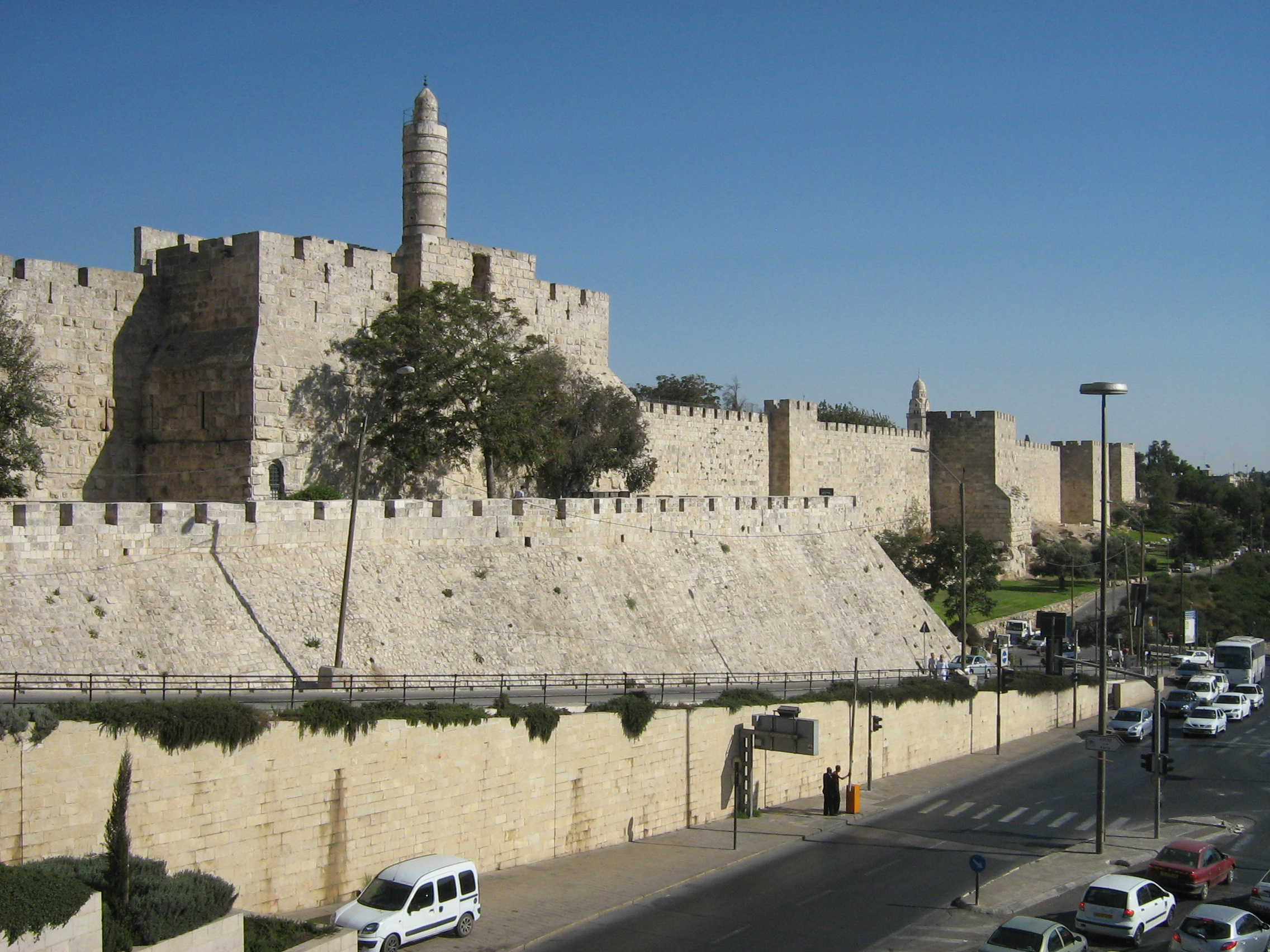 Jerusalem Citadel